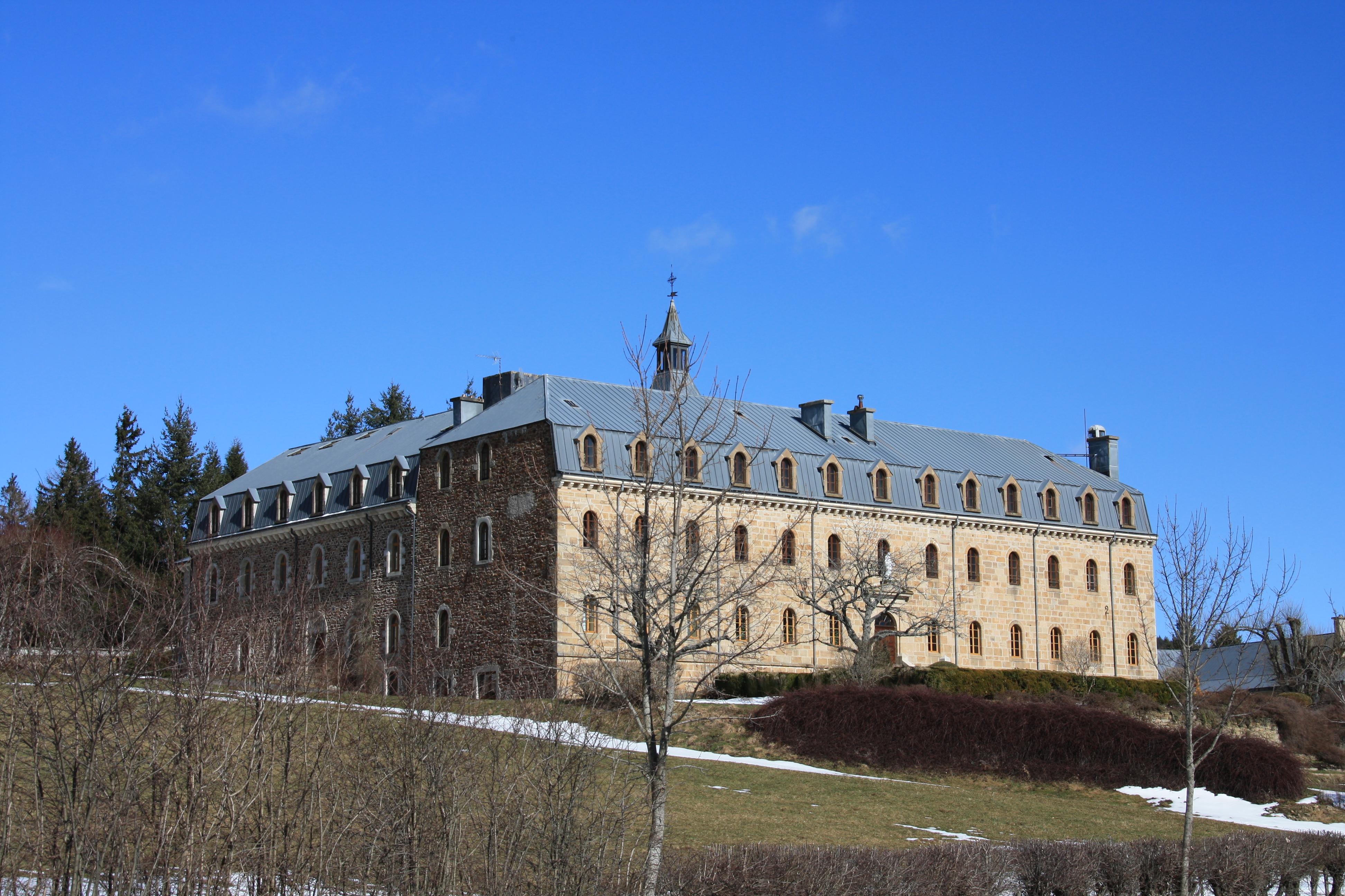 L'Abbaye Notre-Dame-des-Neiges à Saint-Laurent-les-Bains (Ardèche).